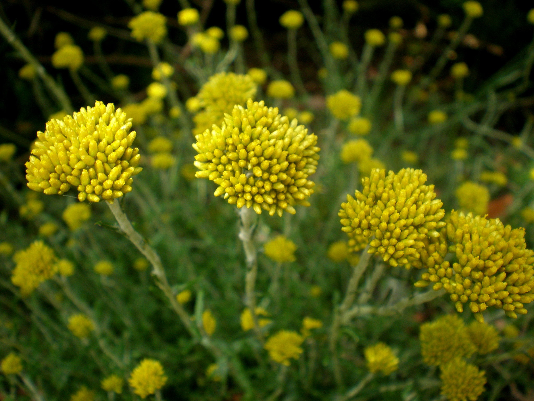 Jardín Botánico de Barcelona.